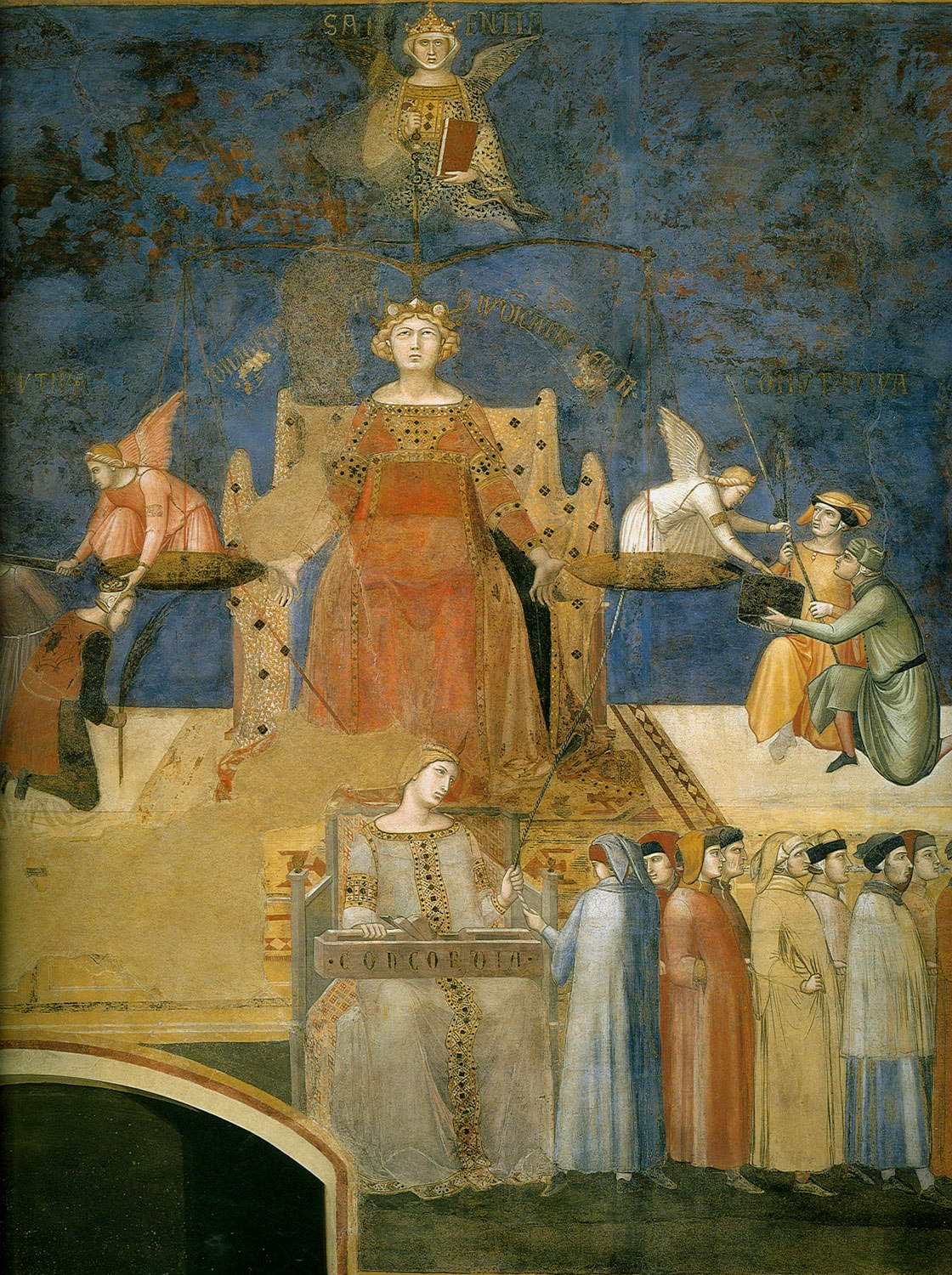 Lorenzetti_Amb._good_government_det..jpg